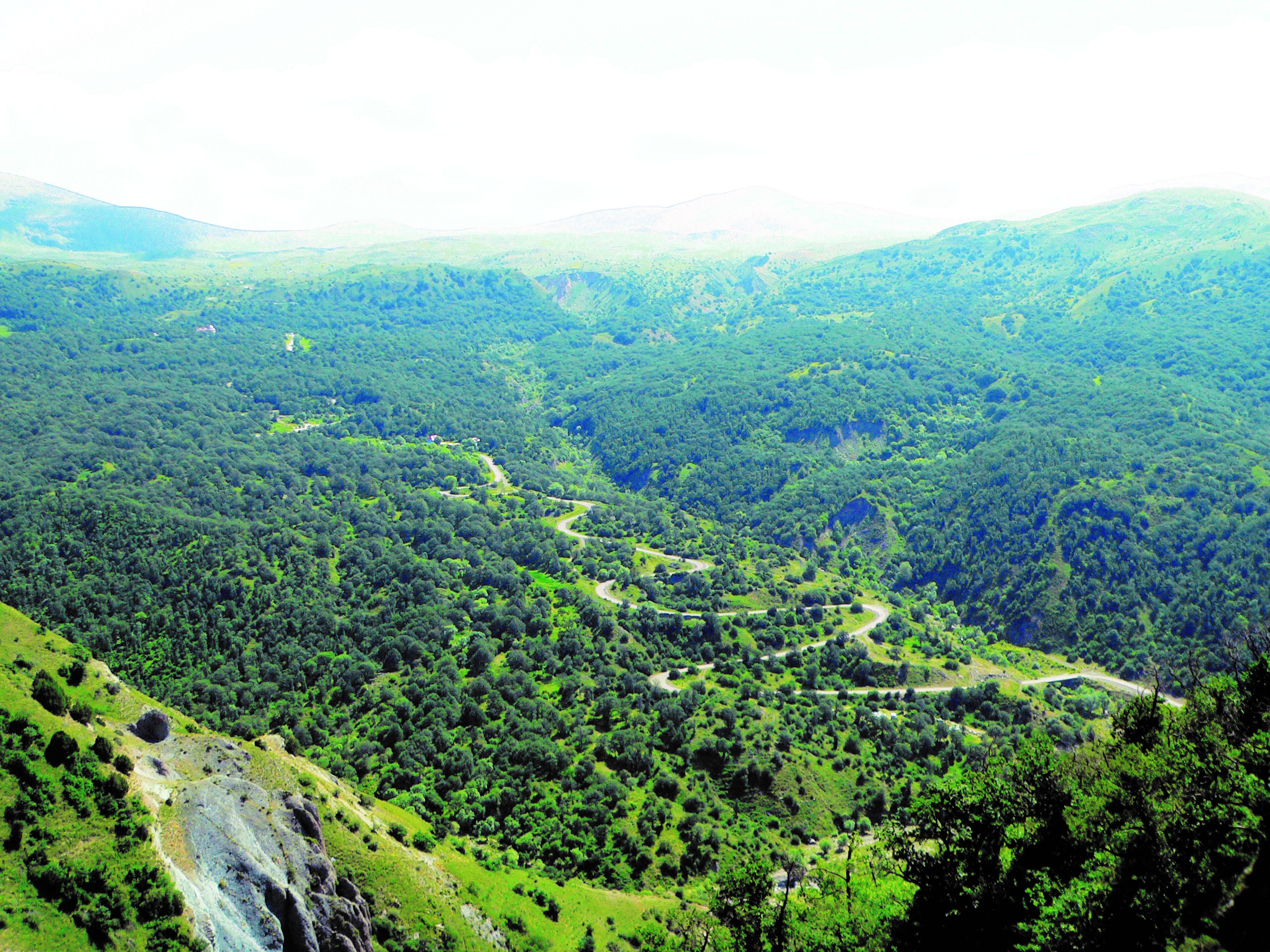 Orta Araz təbii vilayətində meşə-kol örtüyü (Şahbuz rayonu)